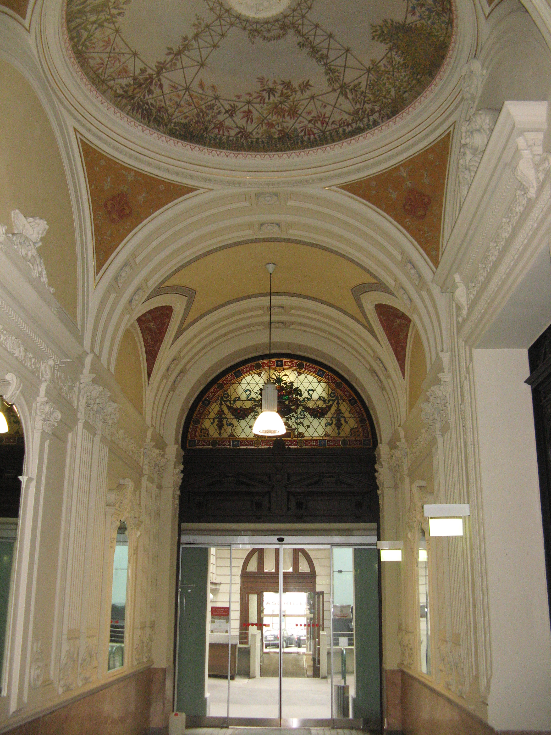 Hausflur, Rathausstraße 4 (1886-87) von Ladislaus Boguslawski, Wien-Innere Stadt